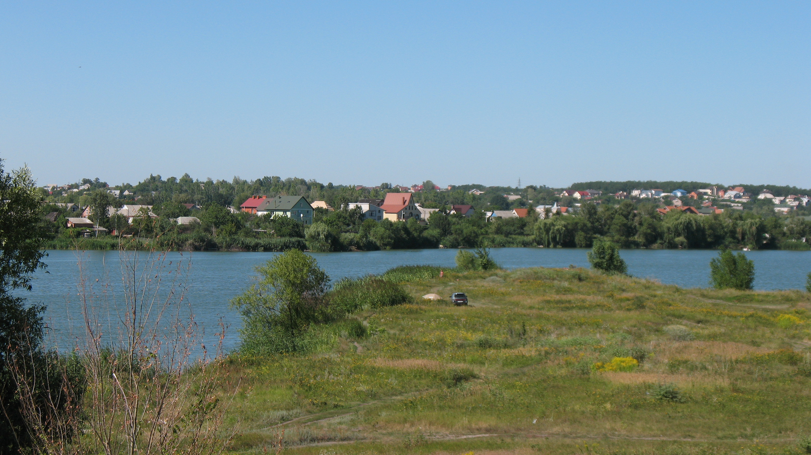 Вид на Ближнюю Даниловку через Журавлёвское водохранилище с дамбы на ул. Героев труда. Вид против течения.